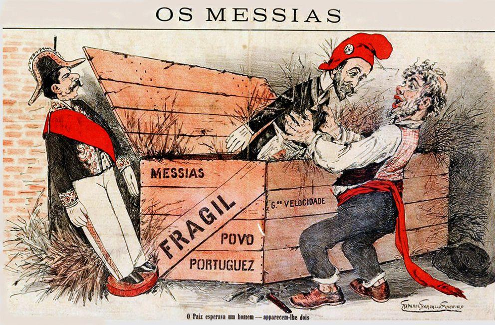 Os Messias. O Paiz esperava um homem: aparecem-lhe dois. Caricatura de João Franco e Bernardino Machado. Litografia de Rafael Bordalo Pinheiro, in A Paródia, 4 de fevereiro de 1904. Arquivo particular Rui Carita, Arquivo Regional da Madeira, Funchal.